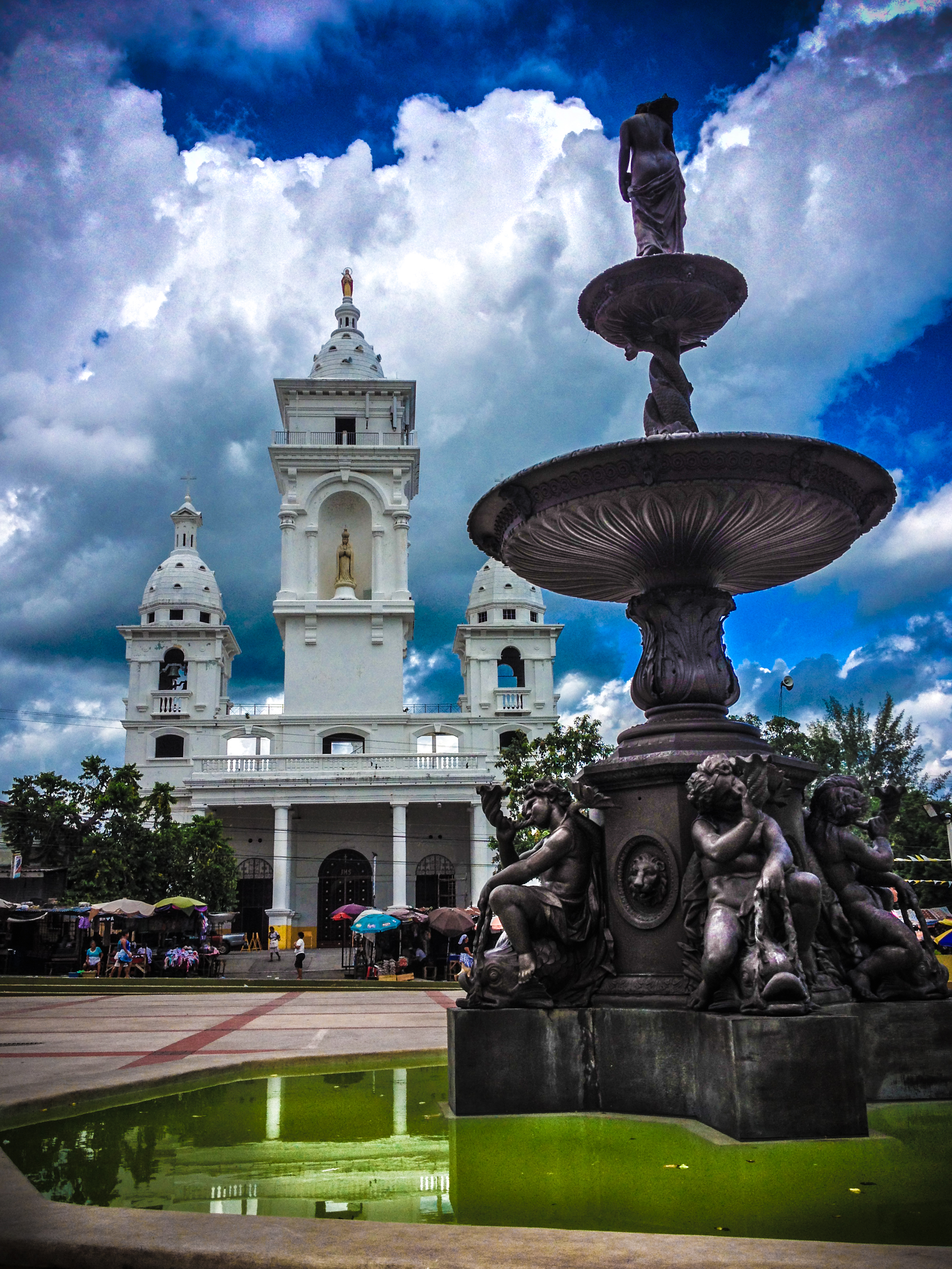 Catedral Nuestra Señora de los Pobres